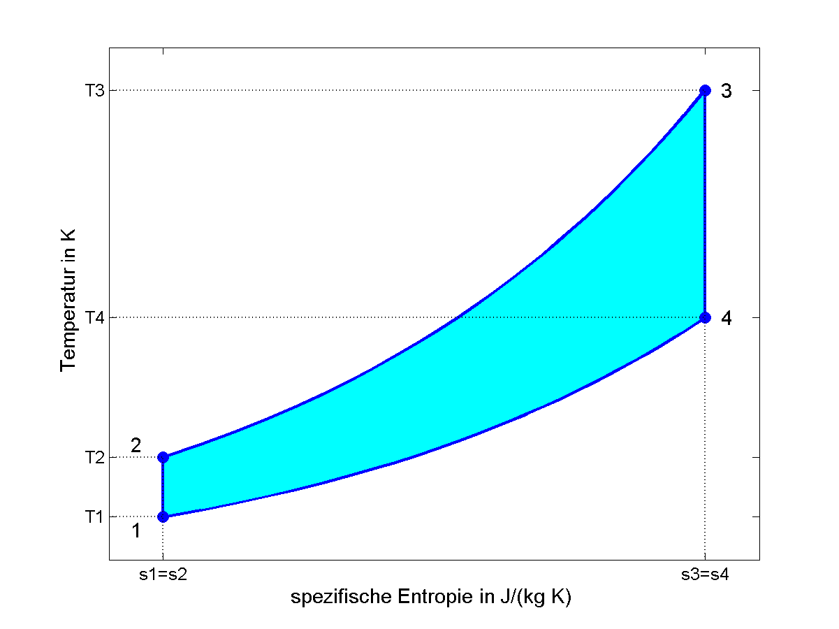 Ts-Diagramm idealer Ottoprozess